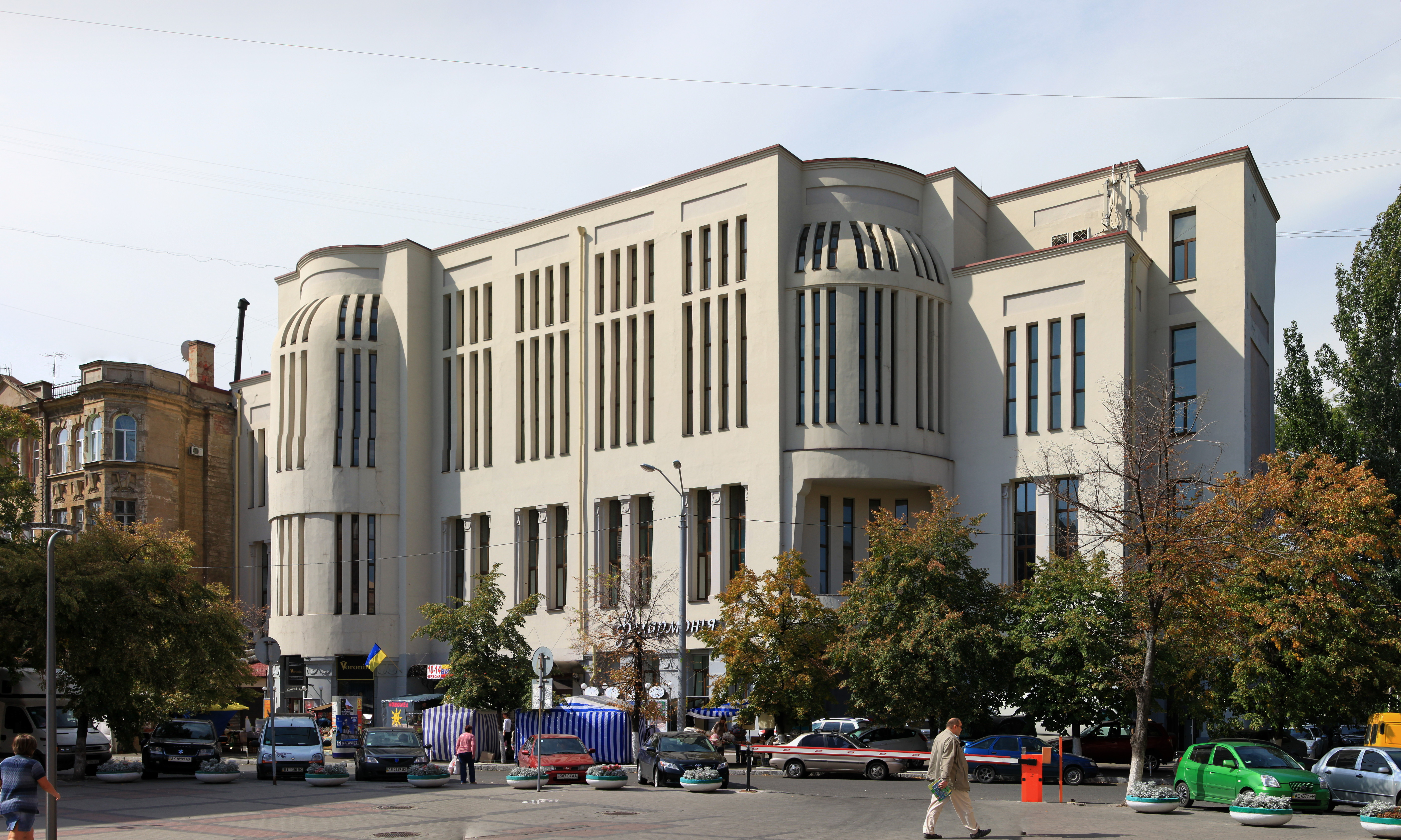 Будинок Громадського зібрання (мур.), Дніпропетровськ, вул.Леніна, 6